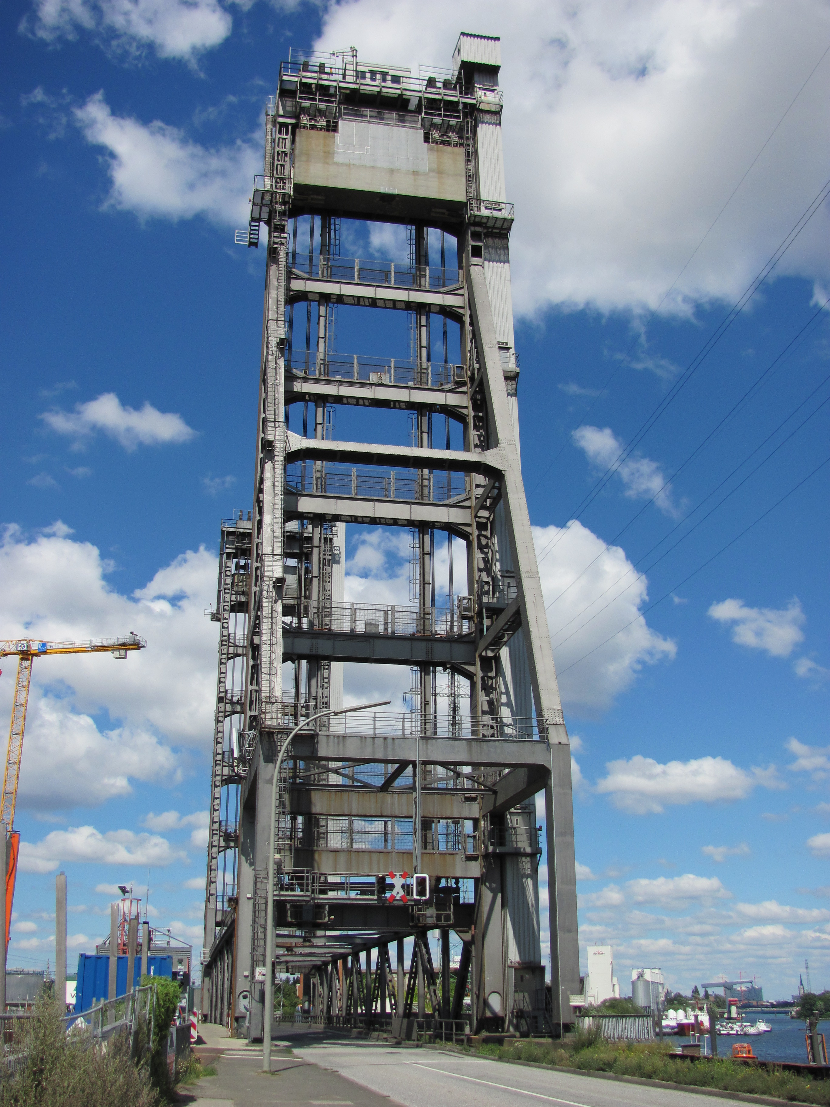 Rethe-Hubbrücke in Hamburg-Wilhelmsburg